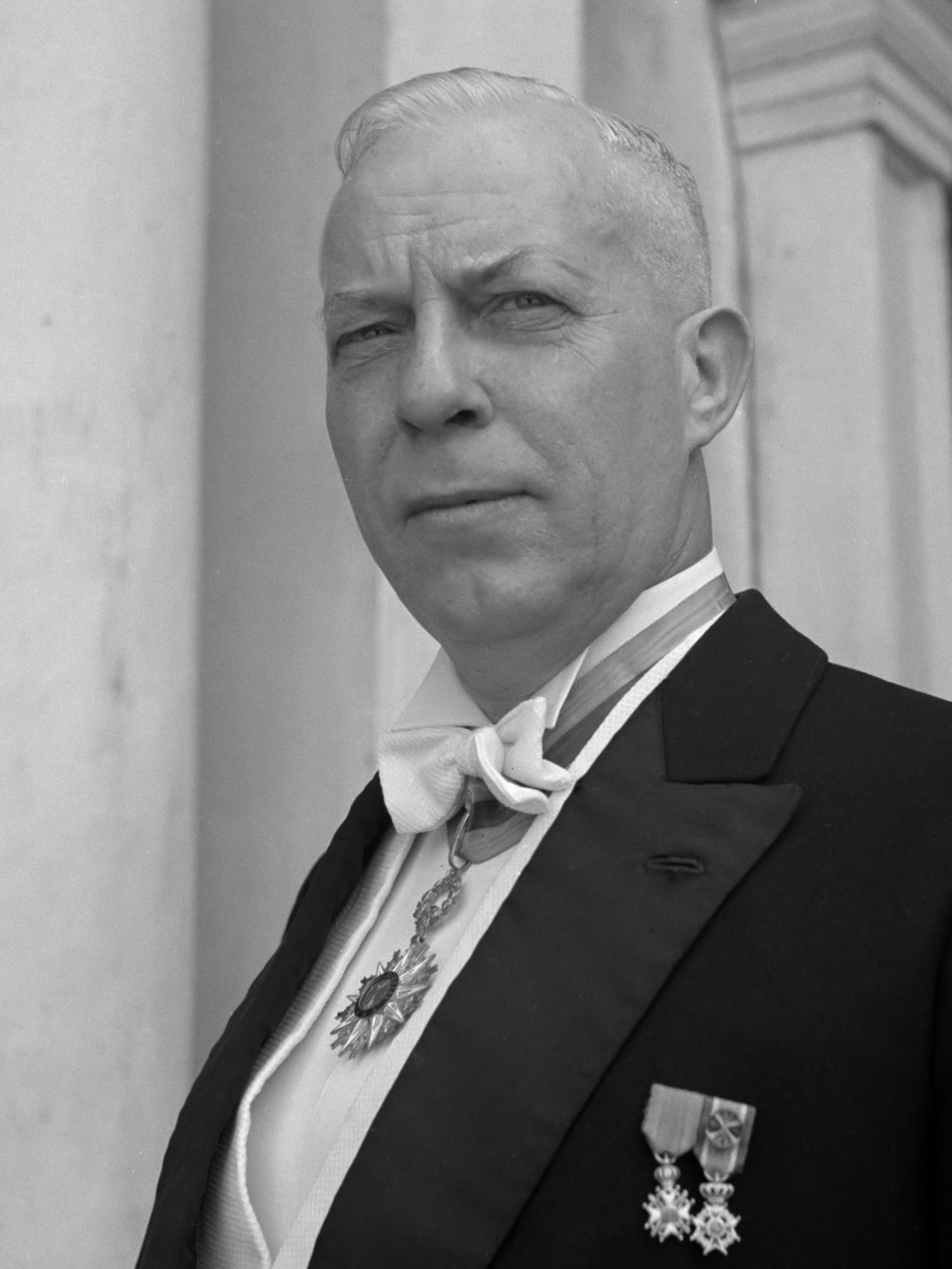 Reis naar Suriname en de Nederlandse Antillen; Oud-gouverneur Maarten de Niet voor het paleis van de gouverneur in Paramaribo. Mr. Maarten de Niet was gouverneur a.i. van Suriname in 1948. 1947